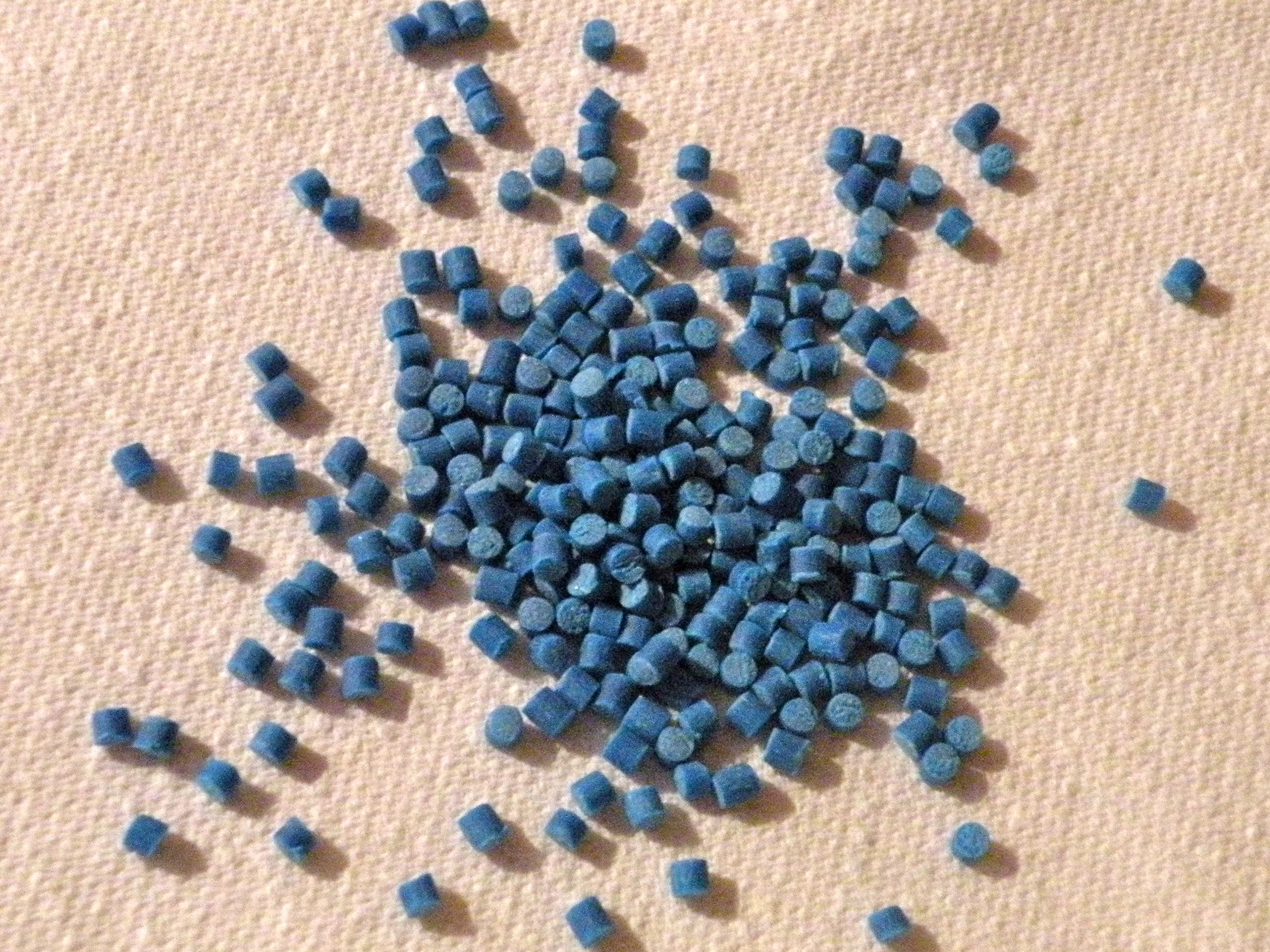 granulé de limacide à base de Métaldéhyde